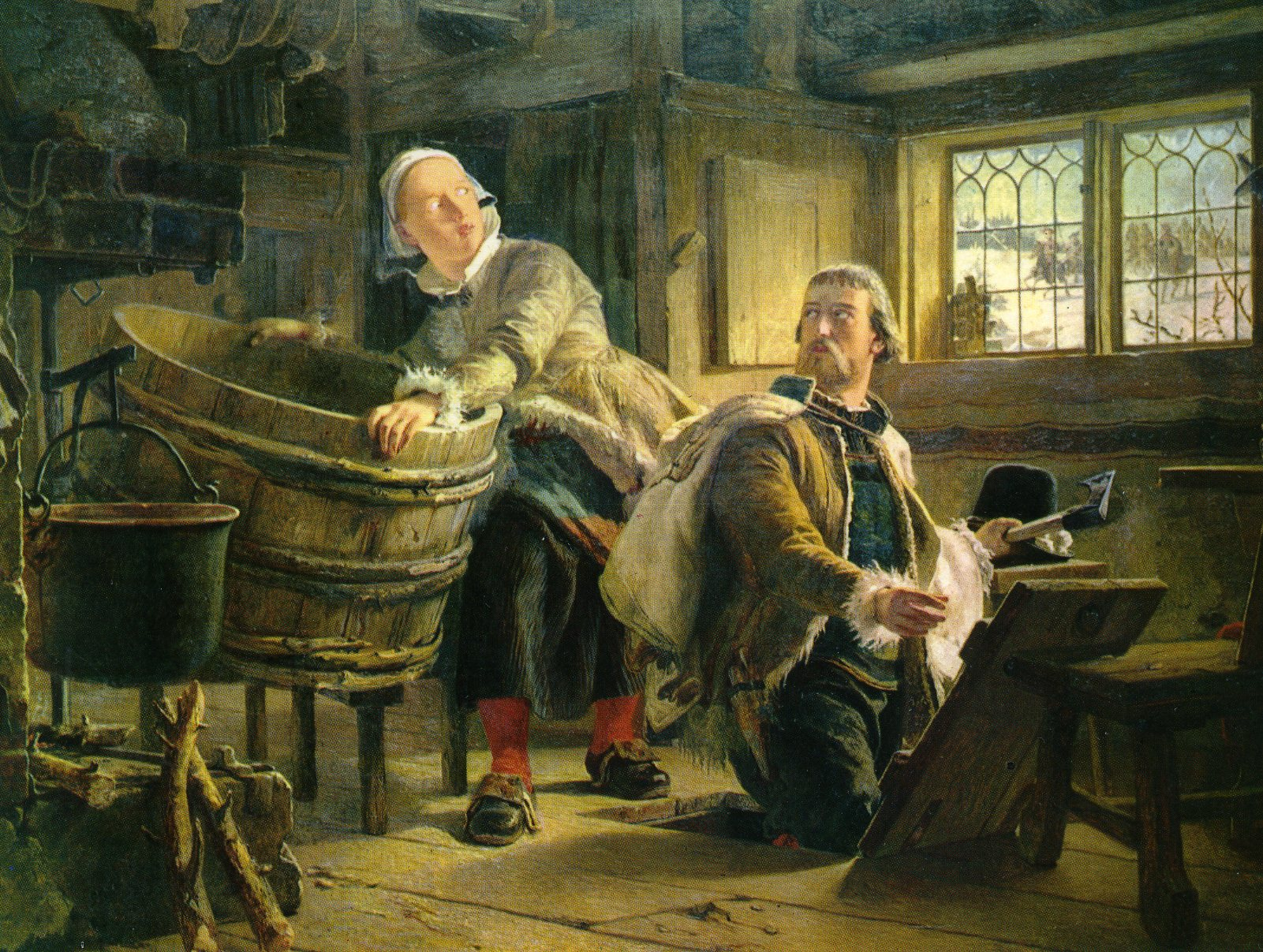 Gustaf Vasa och Tomt-Margitlabel QS:Lsv,"Gustaf Vasa och Tomt-Margit"